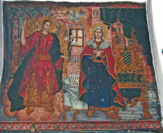 Благовещение, стенопис от „Архангел Михаил” в Копиловци, 1876